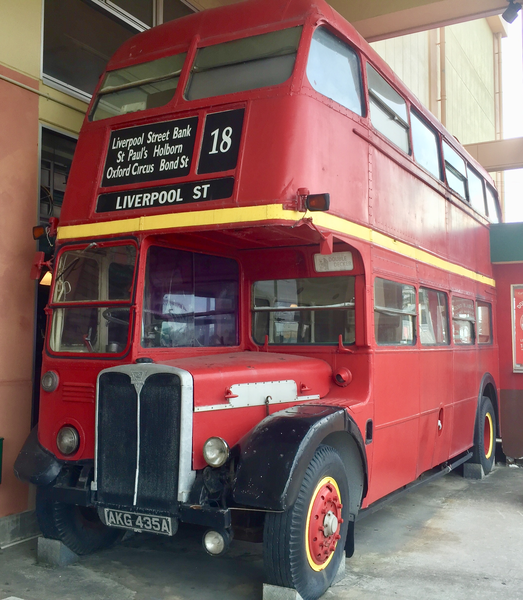 AEC Regent III in Japan (import from UK)